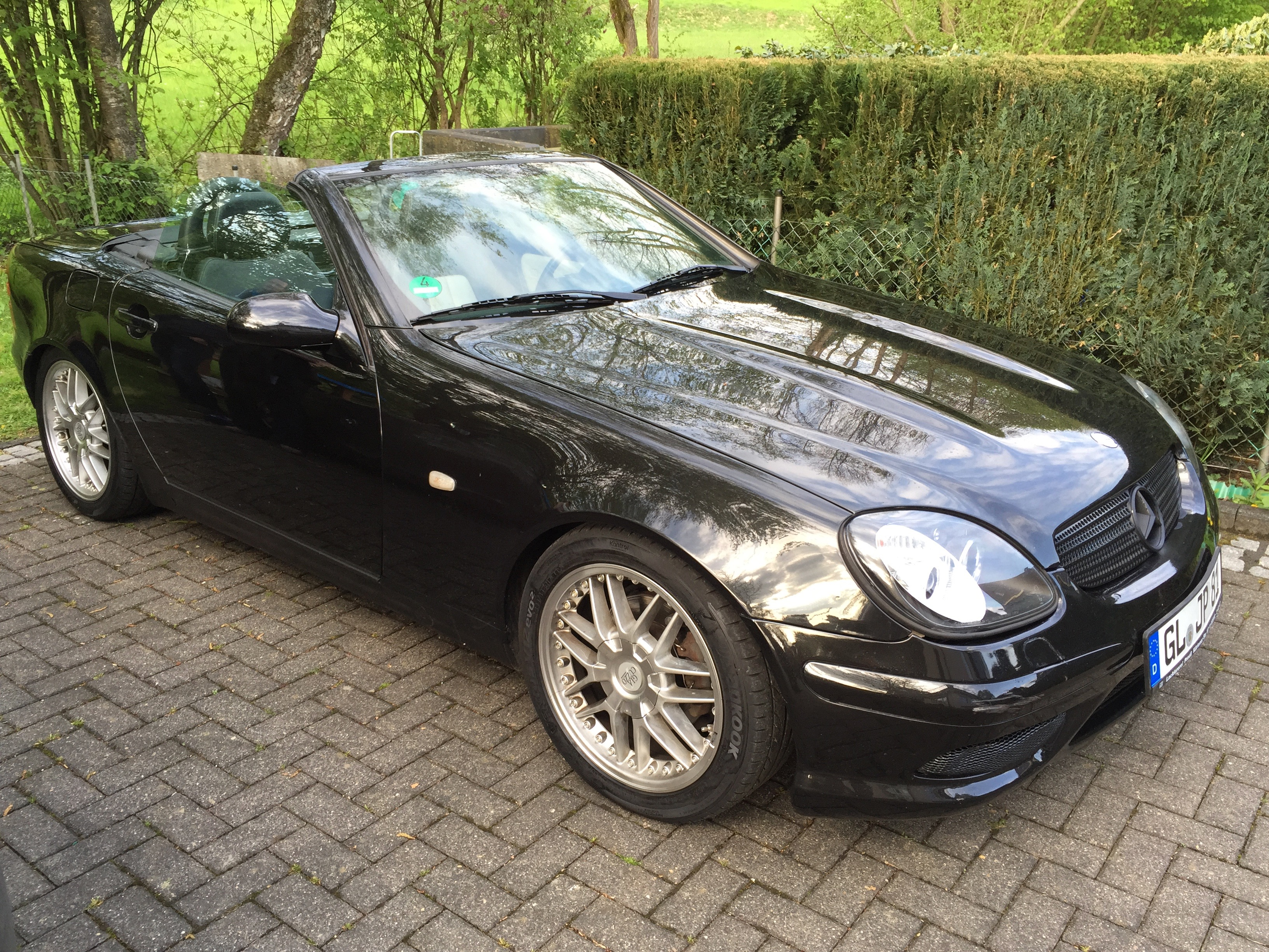 Mercedes SLK R170